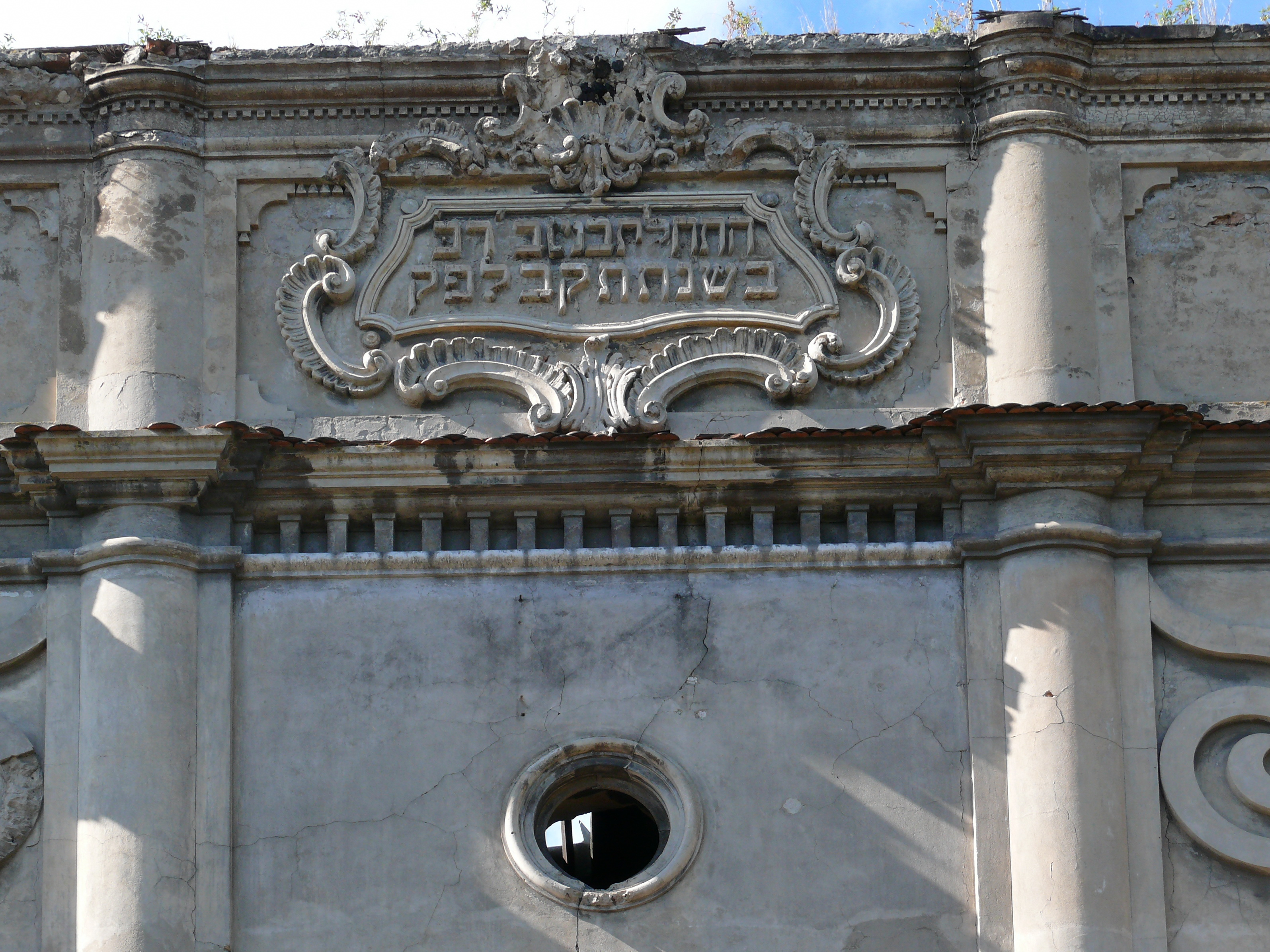 Синагога (мур.) 1742 р. Броди, вул.Гончарська, 12